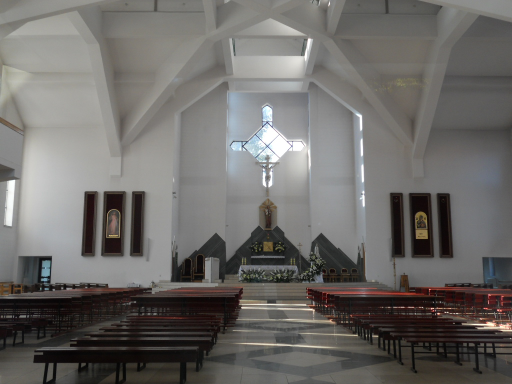 Wnętrze Kościoła św. Józefa w Krakowie na Osiedlu Kalinowym w Krakowie.